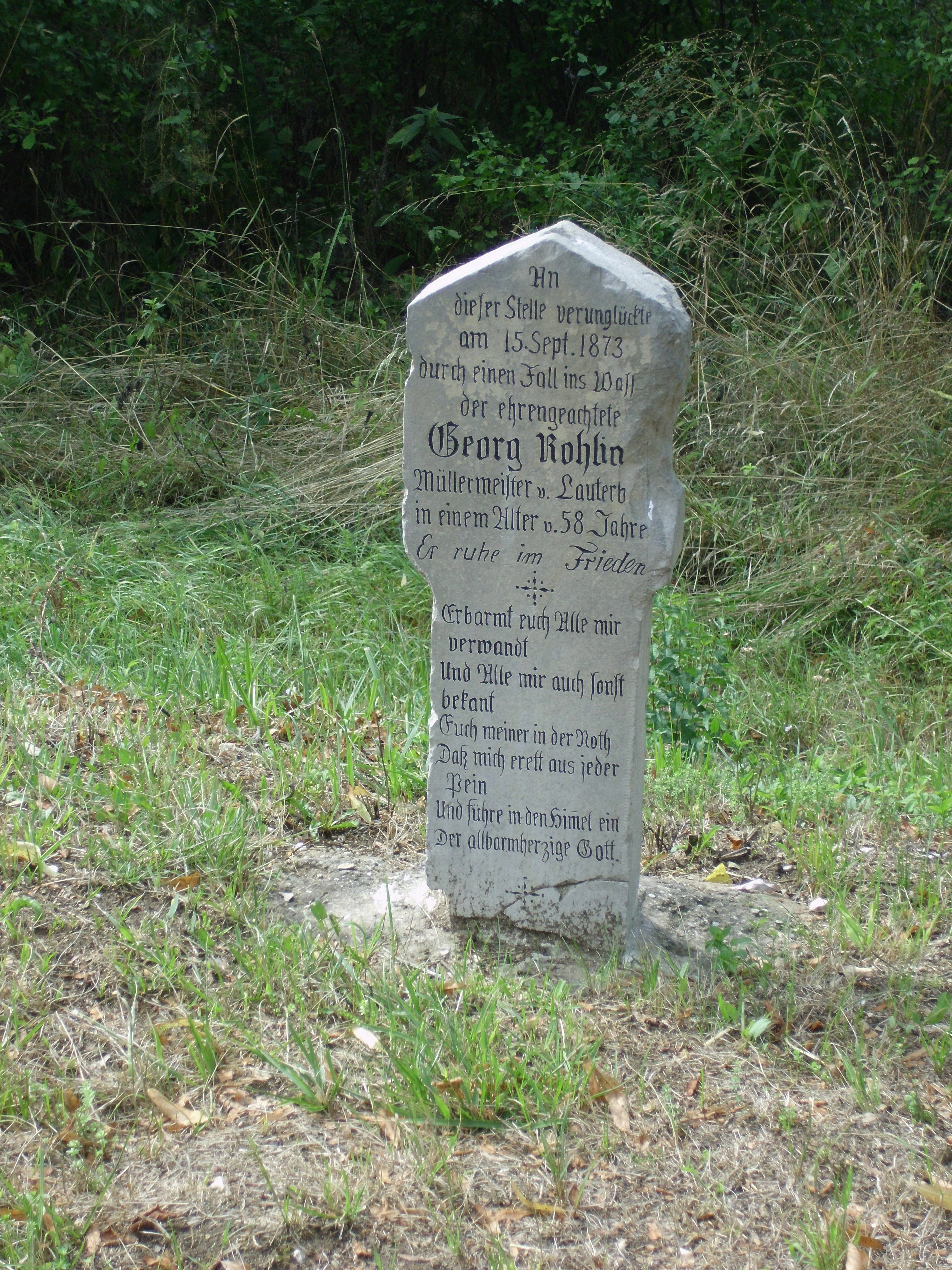 Untermässing, Ortsteil von Greding im mittelfränkischen Landkreis Roth, Marterl von 1873